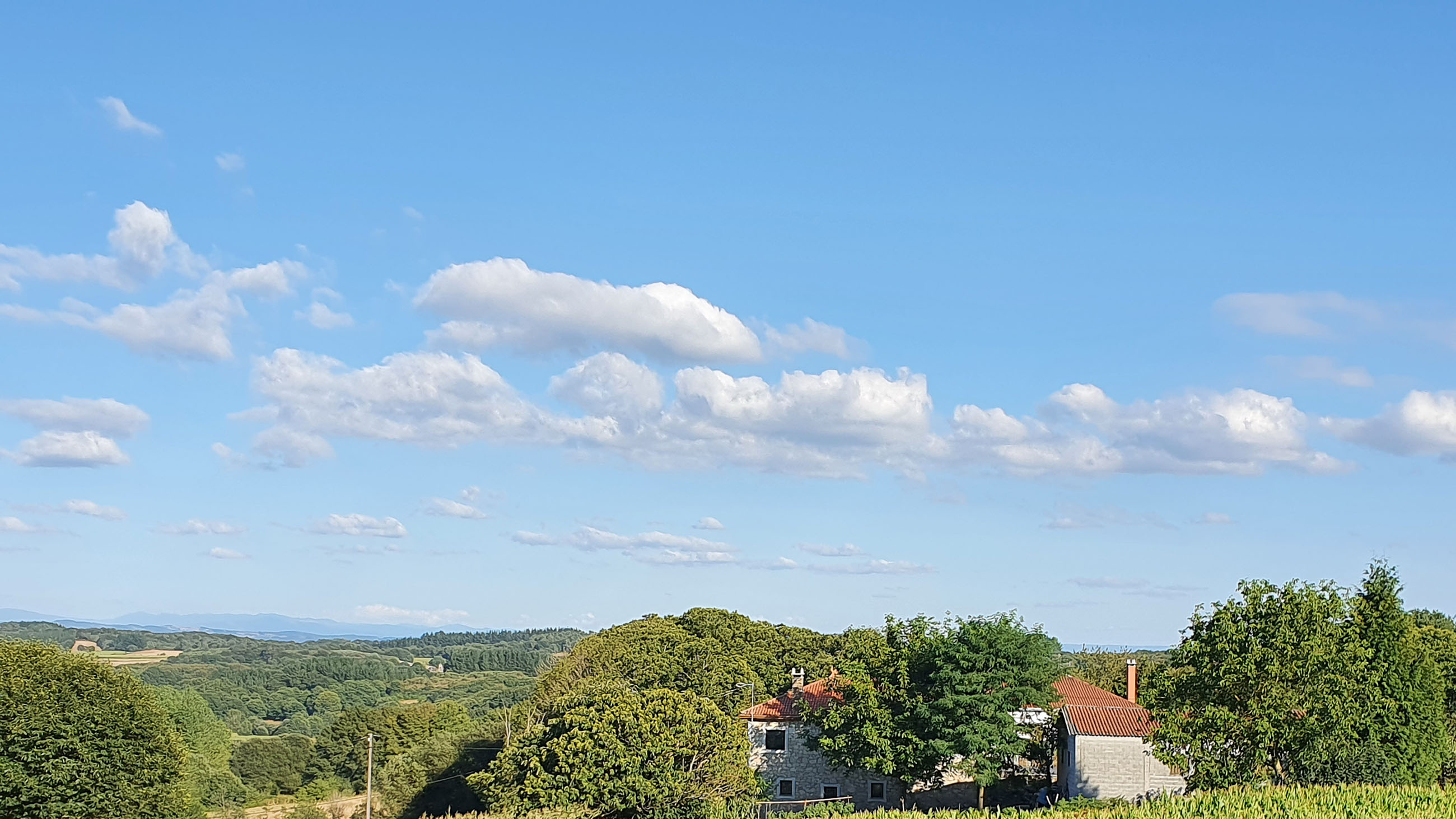 Lugar da Escrita, na parroquia de Olveda (Antas de Ulla).